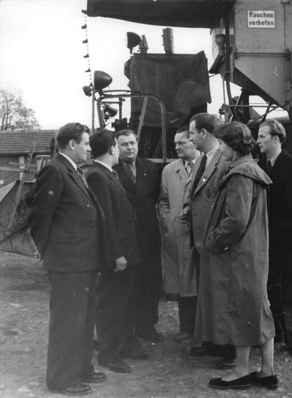 Heusdorf, Besuch von Künstlern Zentralbild Bez. Red. Erfurt 20.10.1955 Wehse-3236 Me-Ge 2 Motive Künstlerkollektiv des Thälmann-Films auf der MTS Apolda-Heusdorf. Zu einem großen Erlebnis für die Landbevölkerung des Kreises Apolda, Bezirk Erfurt, wurde die Aufführung des Films Ernst Thälmann - Führer seiner Klasse am 18.10.55 im Kulturhaus der MTS Apolda-Heusdorf. An der Vorstellung nahmen Künstler, die im Thälmann-Film mitwirkten, teil. UBz: Auf dem Hof der MTS. (w.v.r.) Nationalpreisträger Günter Simon im Gespräch mit dem Politleiter der MTS, Koll. Sachs (1.v.l.) un dem Direktor der MTS, Nationalpreisträger Wolfgang Hahn (2.v.l.)